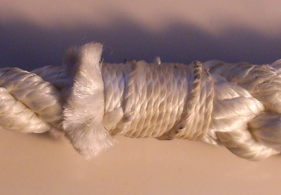 Geknüpfter Takling (halbe Schläge)